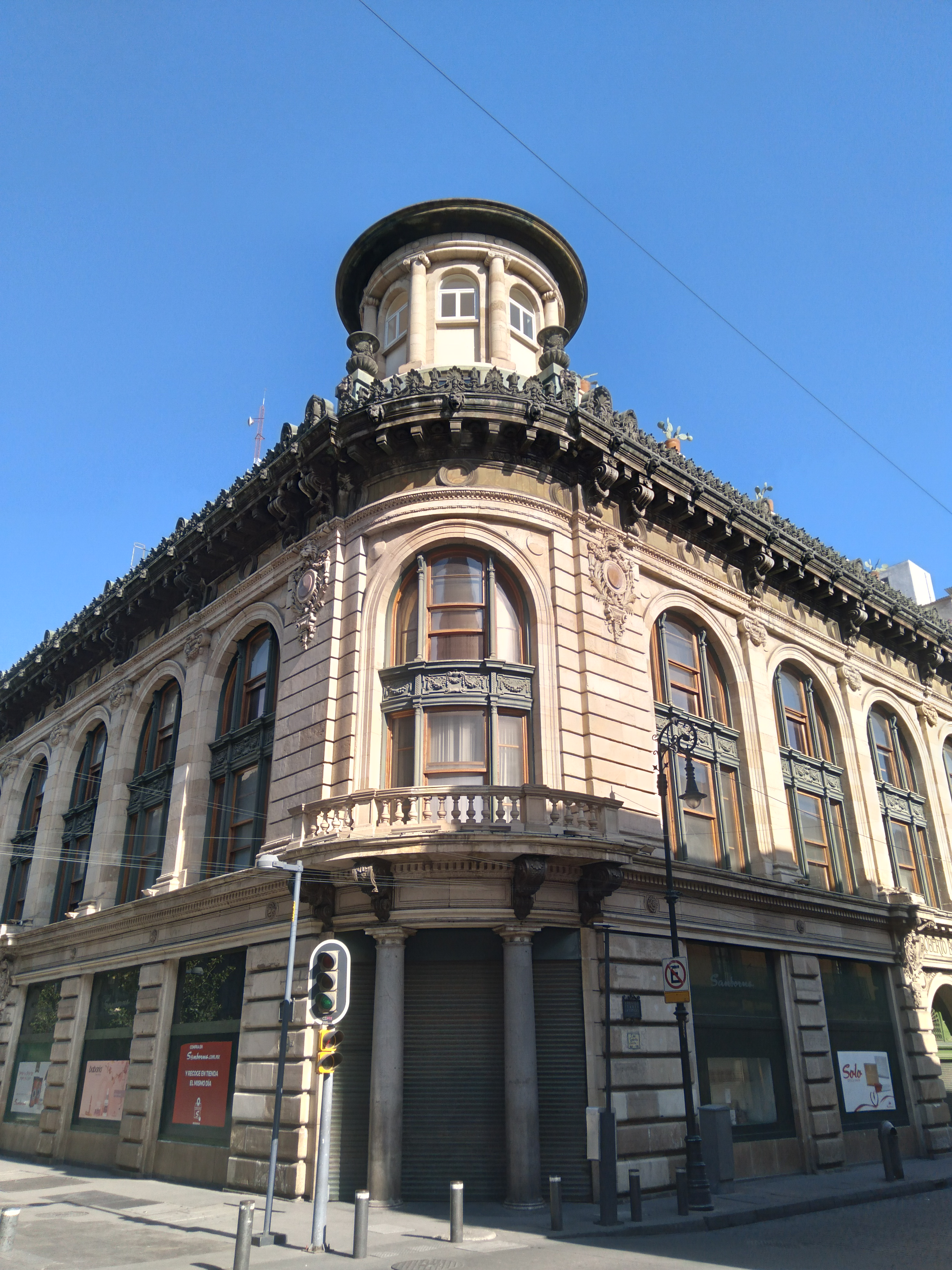 Edificio sede de la casa Boker en el centro histórico de la ciudad de México